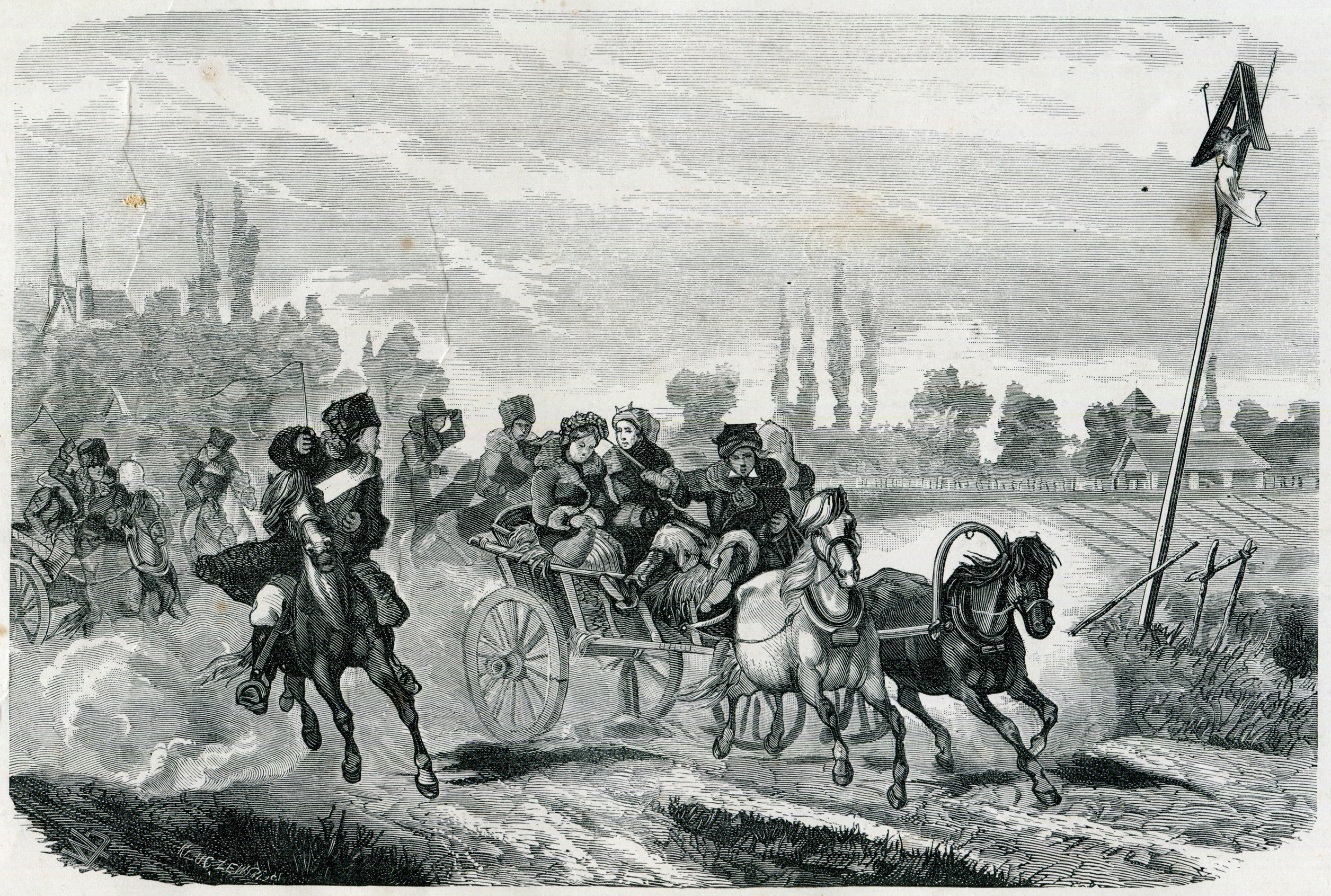 Беларуская (тарашкевіца): Вяртаньне зь вясельля